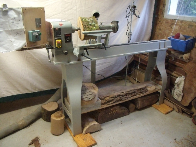 tour à bois d'atelier , bati en fonte et variateur electronique